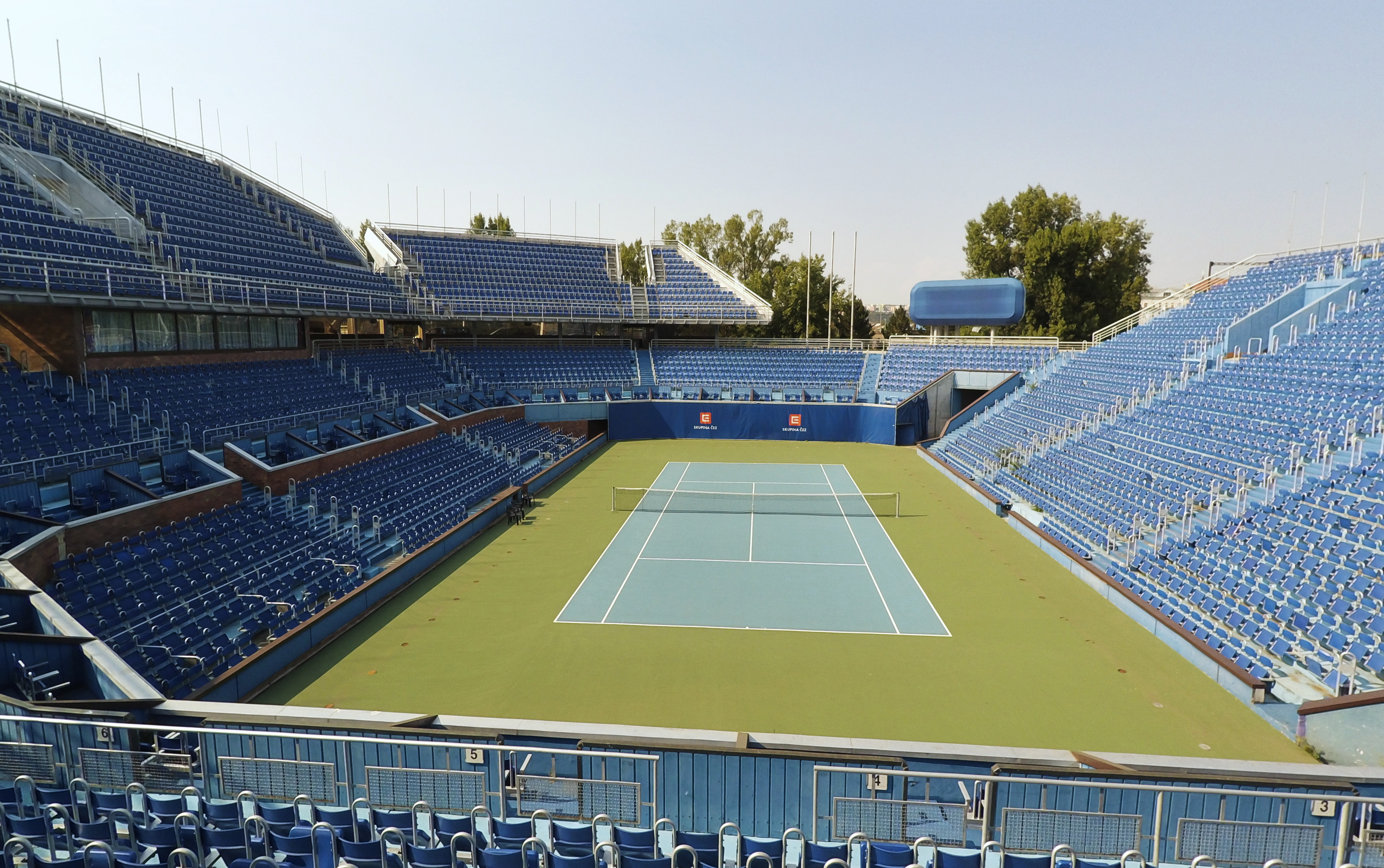 Štvanický centrkurt s tvrdým povrchem, srpen 2015